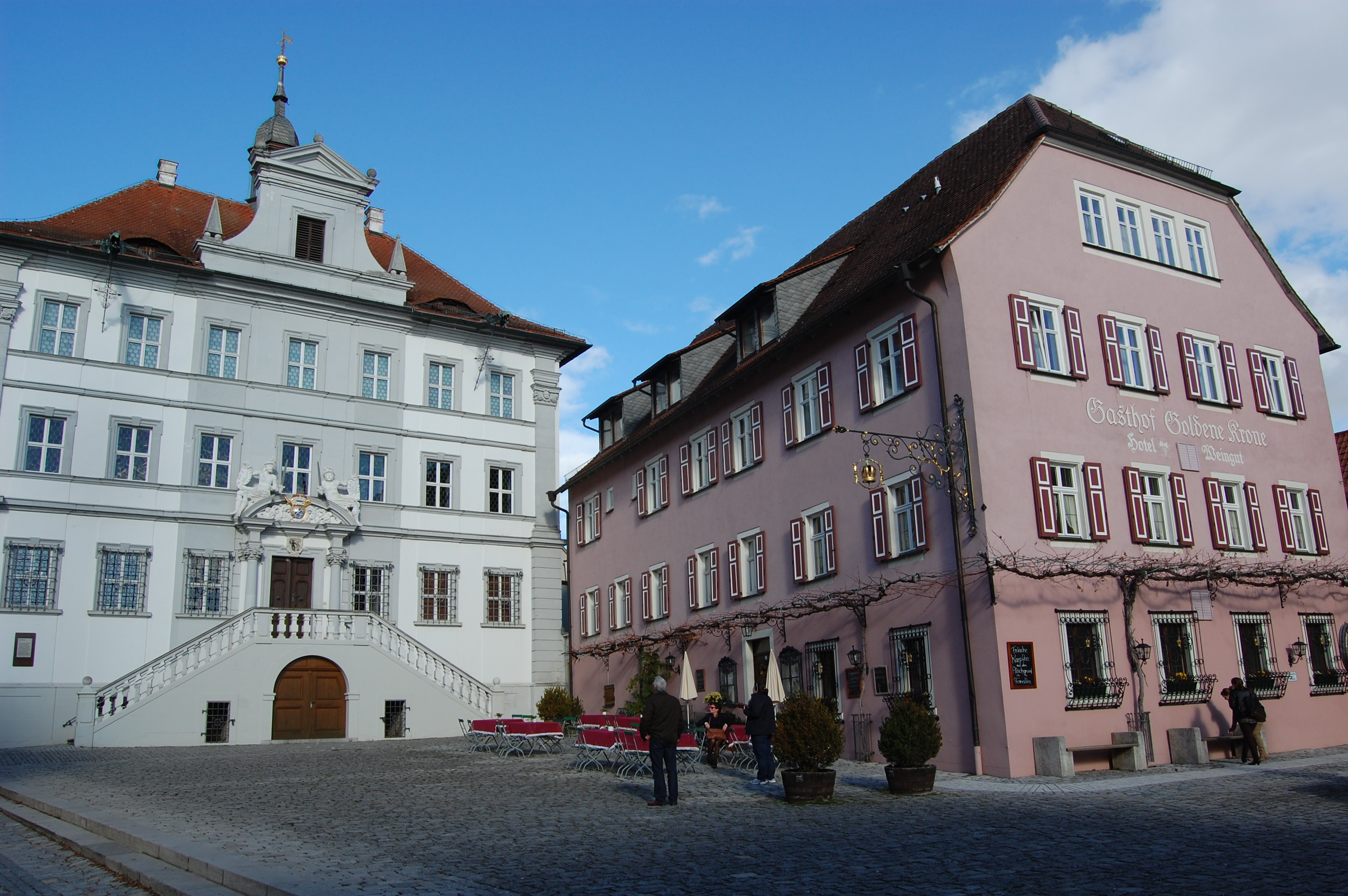 Część umocień miejskich Iphofen